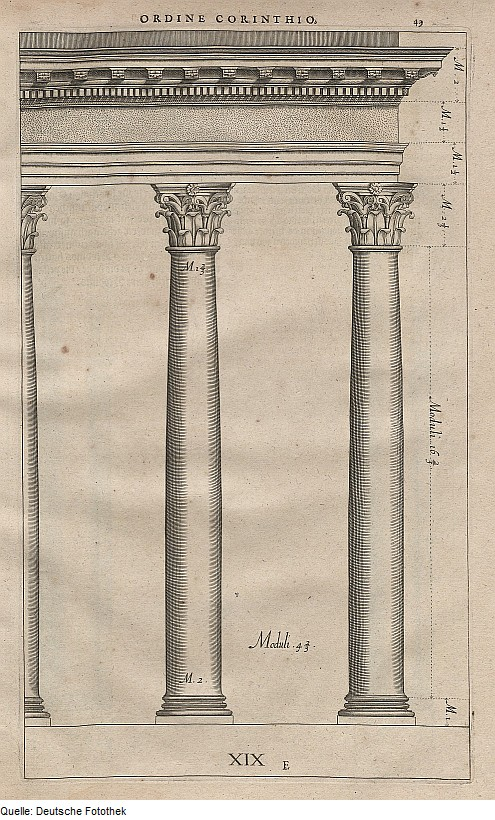 Original image description from the Deutsche Fotothek Architektur & Bauwesen & Säule & korinthische Ordnung & Basis & Kapitell & Fries & Karnies & Architrav